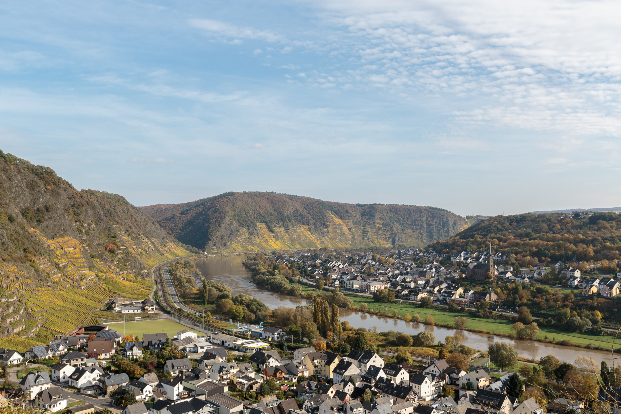 Terrassenmosel bei Kobern-Gondorf und Dieblich